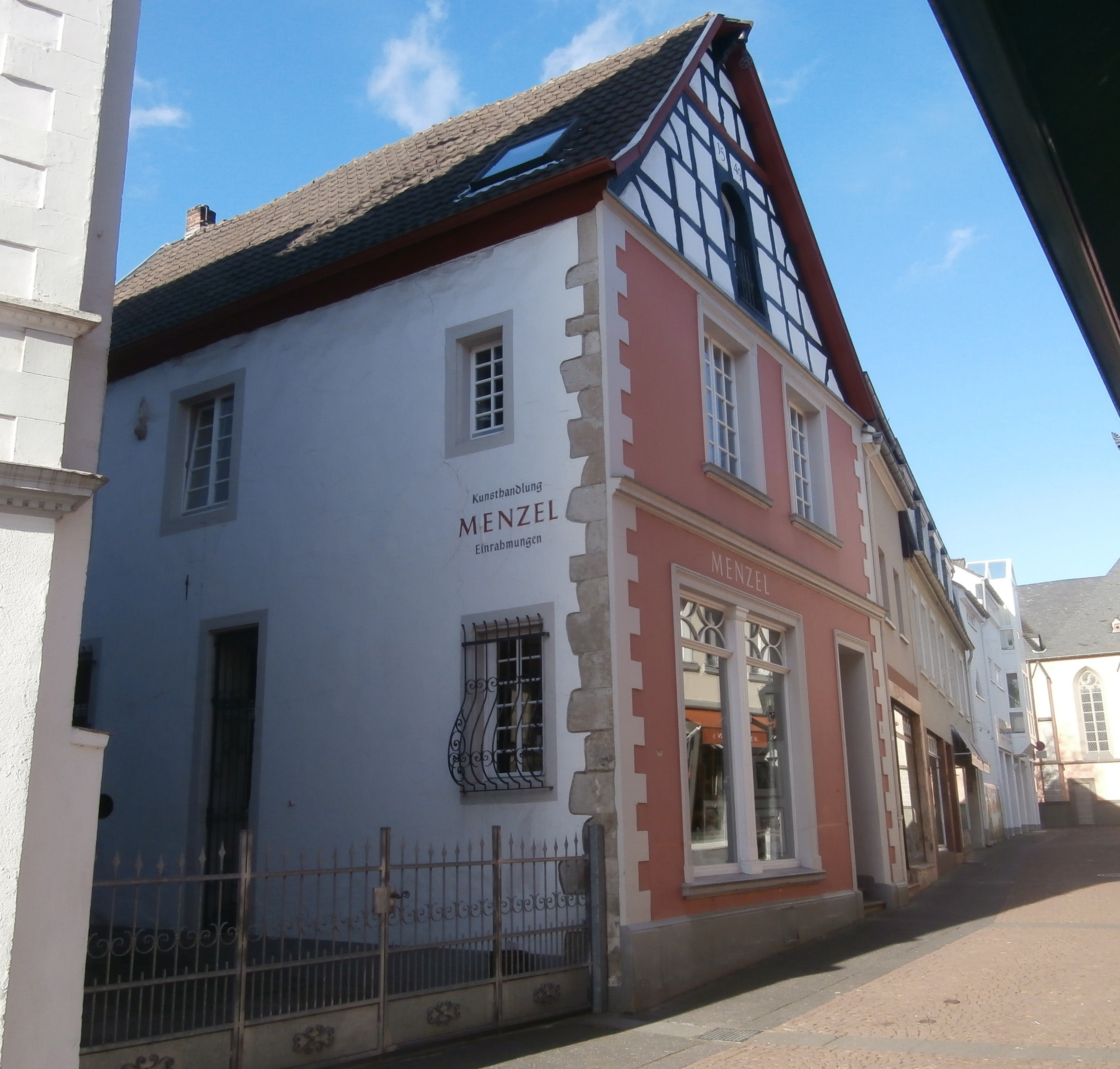 Denkmalgeschütztes Wohn- und Geschäftshaus, Kirchstraße 8, Bad Honnef